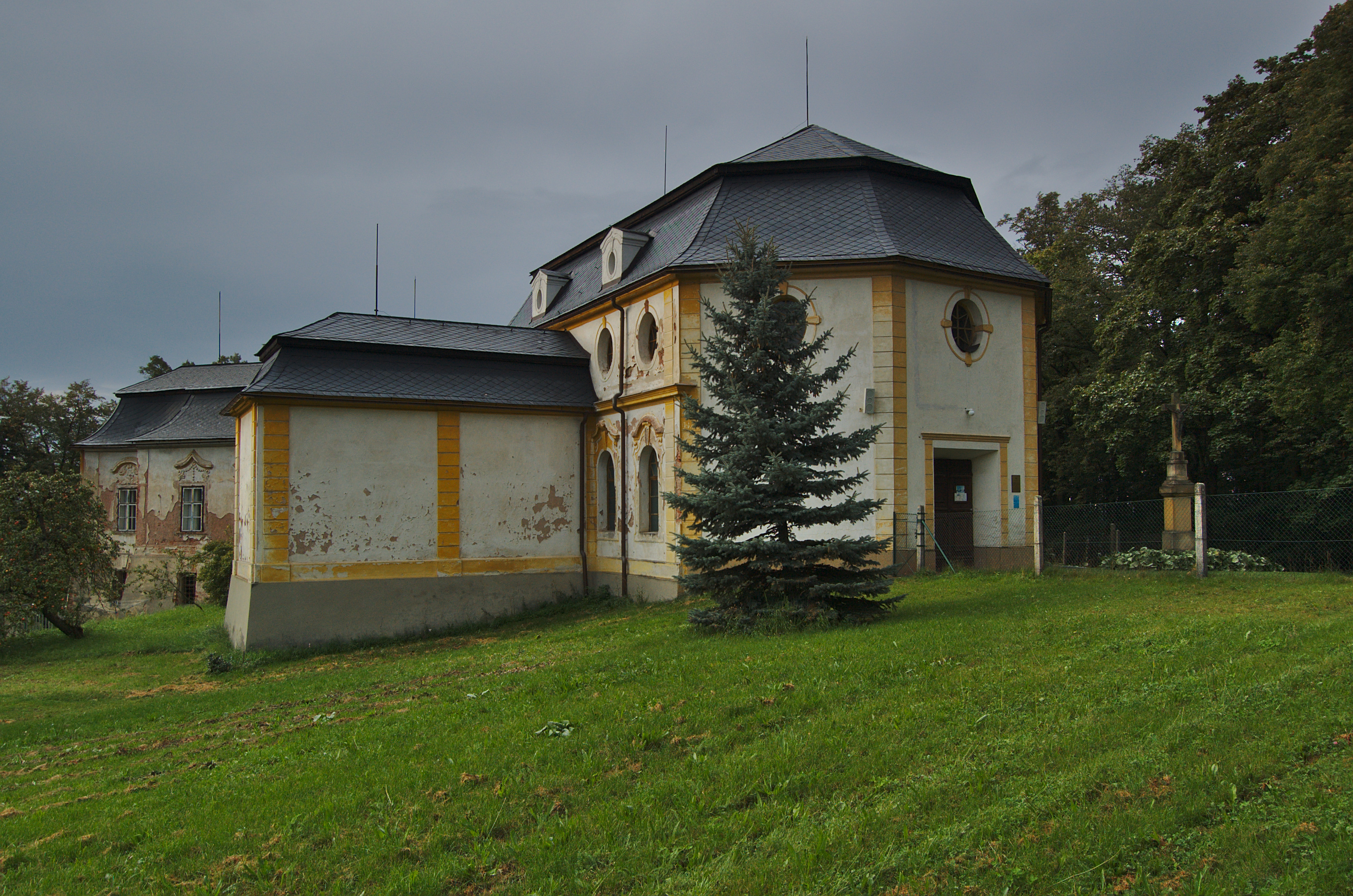 Fara u kostela Povýšení svatého Kříže na Kalvárii, Jaroměřice, okres Svitavy